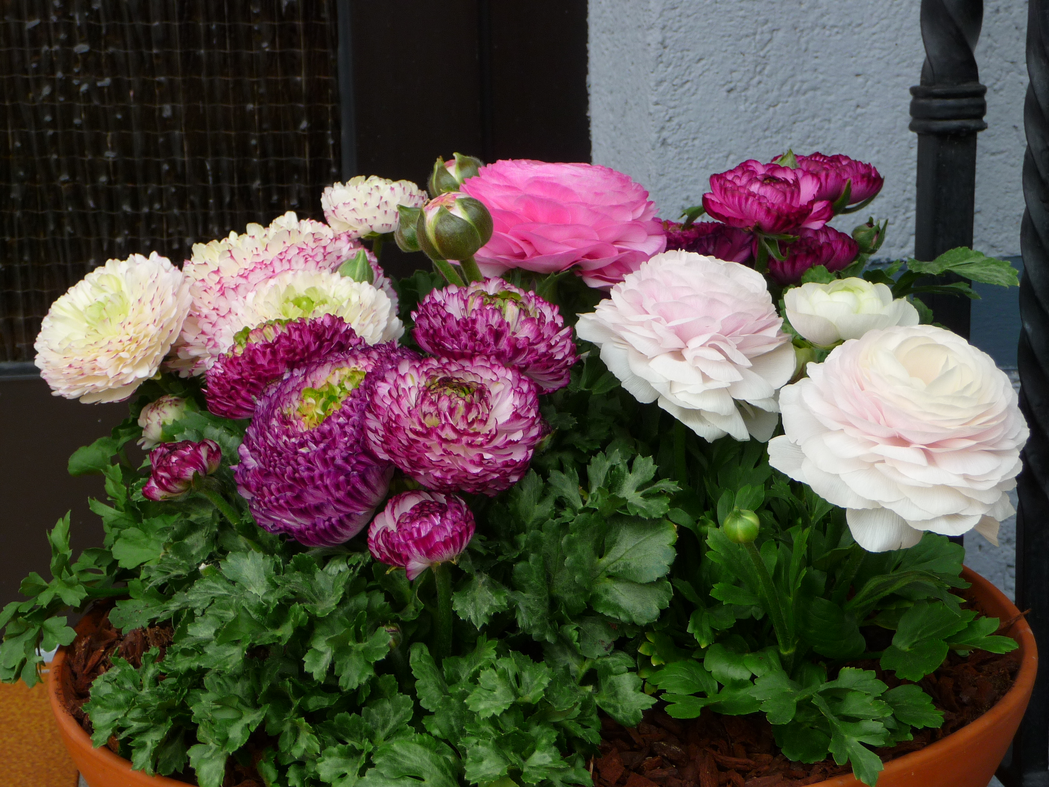 Ranunkeln (Ranunculus asiaticus), fotografiert in Deutschland